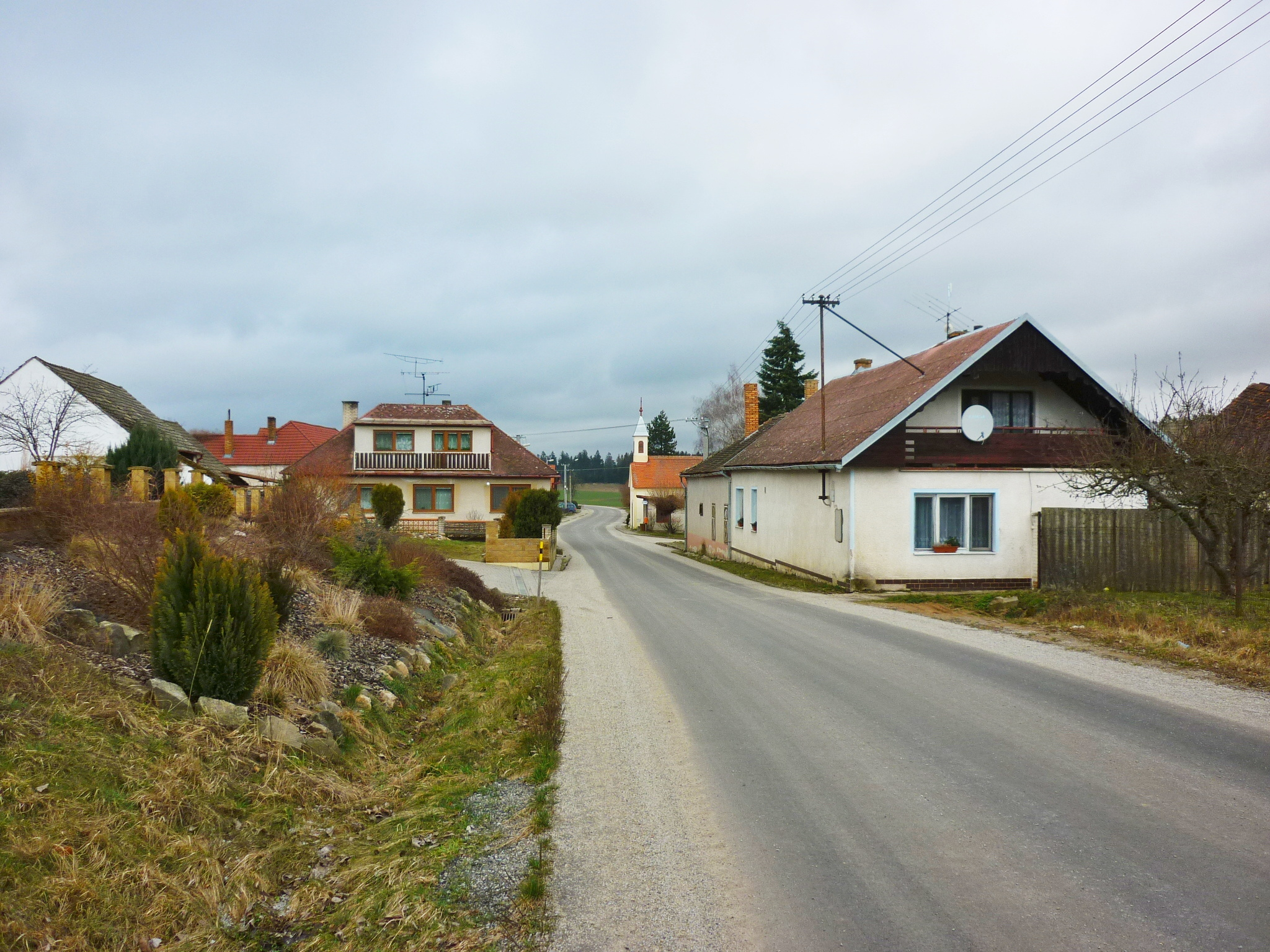 Nové Dvory příjezd od Starého Hobzí